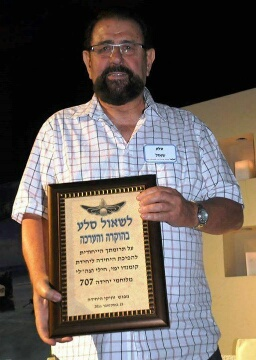 אל"מ מיל שאול סלע במפגש ותיקי יחידה 707